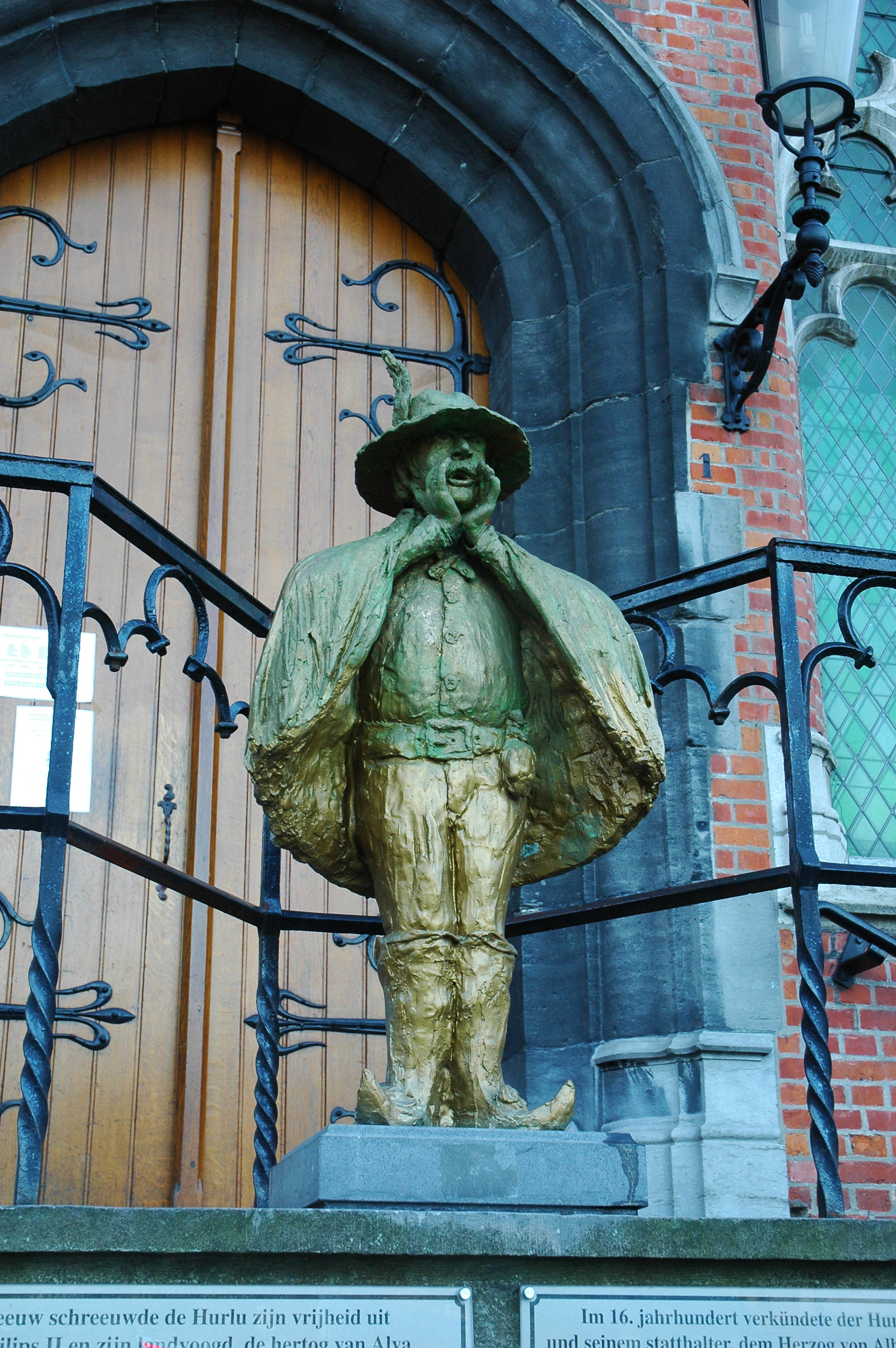 Mouscron (Belgique). La statue du Hurlu ornant le perron (façade) de l'hôtel-de-ville.